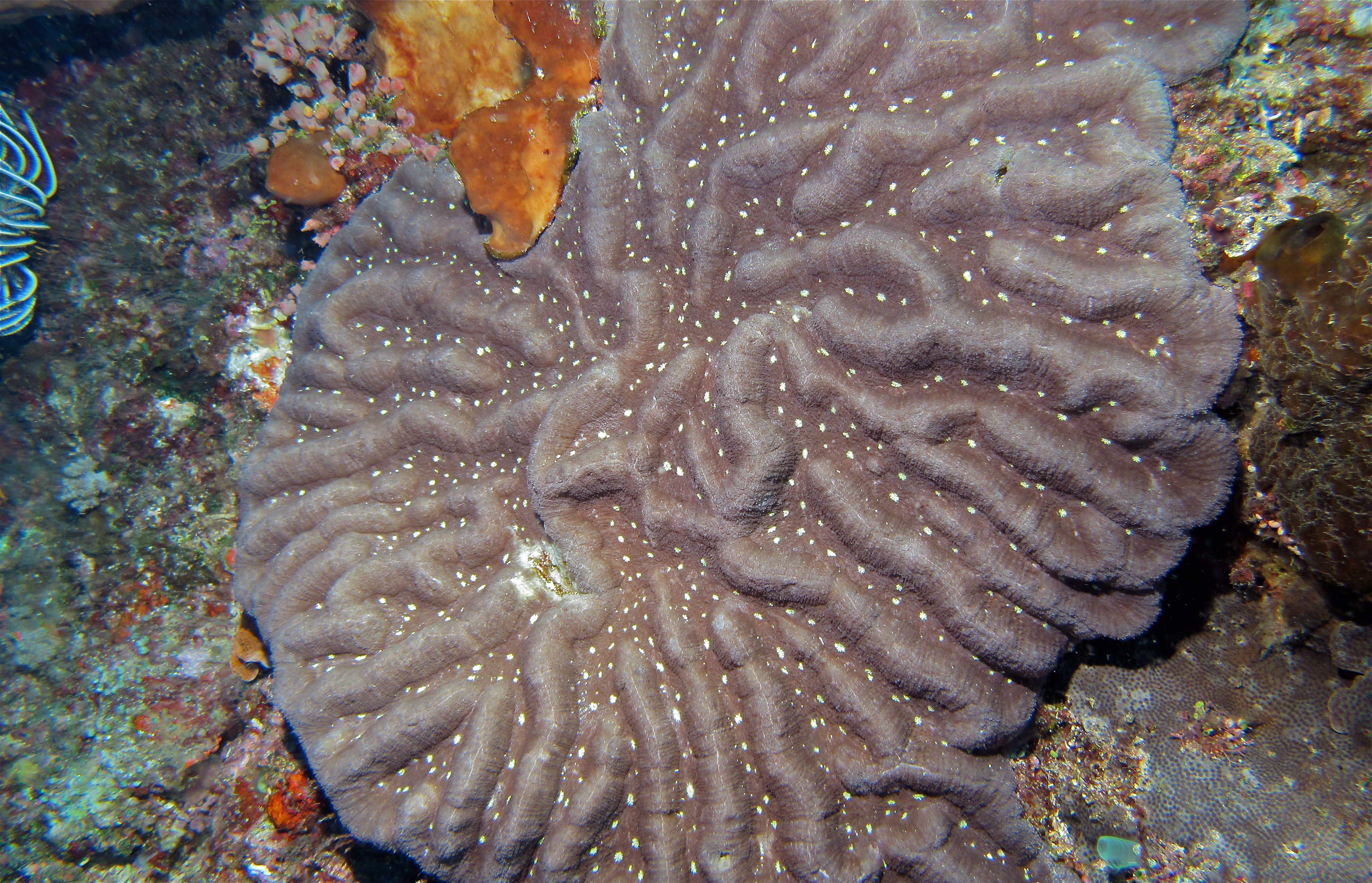 Mandoline, Bunaken Island, Sulawesi, INDONESIA